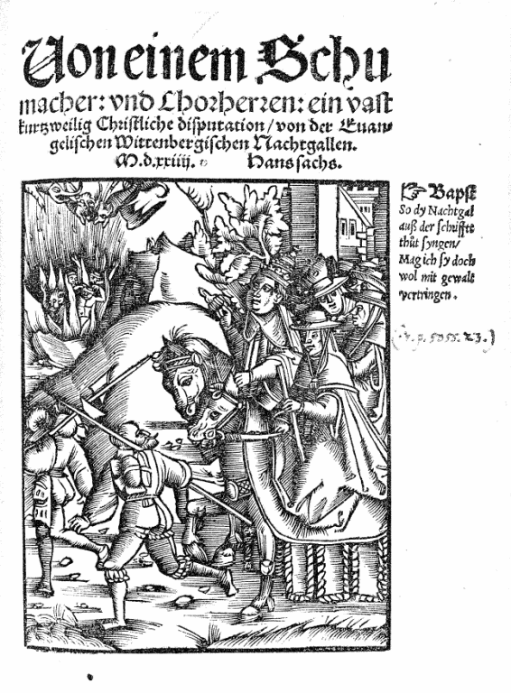 Bei Verwendung sollte auf das Original verlinkt werden.